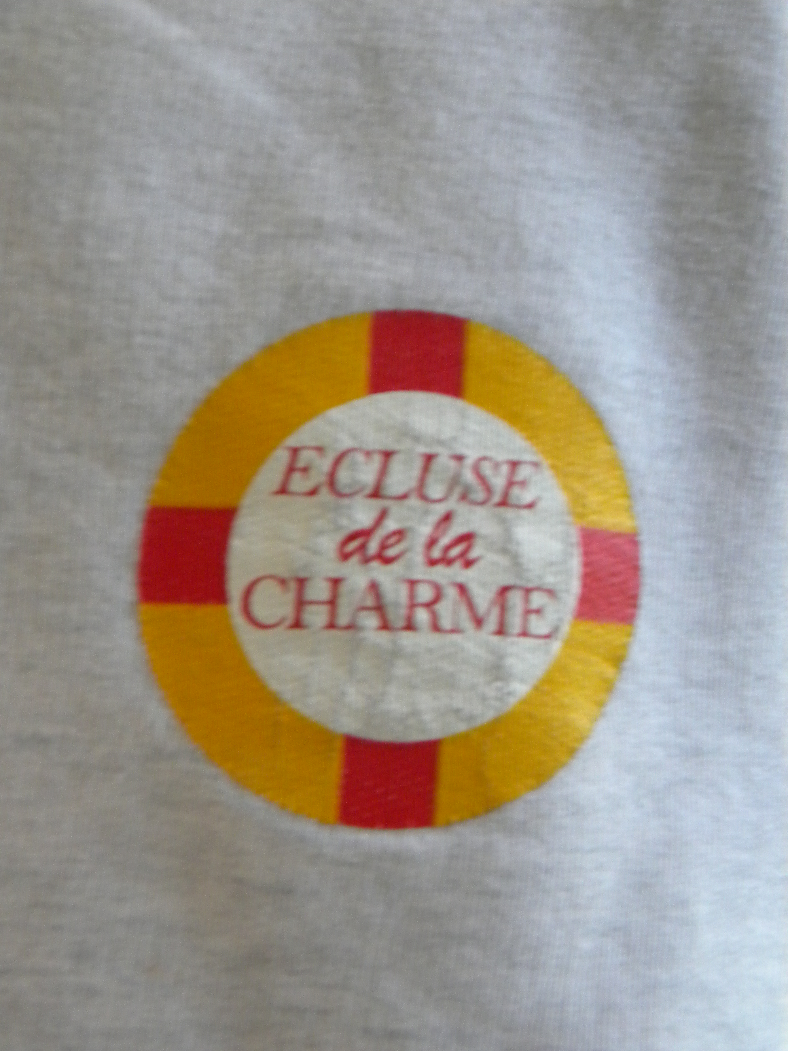 Kluzo de la Charme sur vestajxo